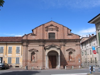 Chiesa di San Francesco d'Assisi a San Colombano al Lambro